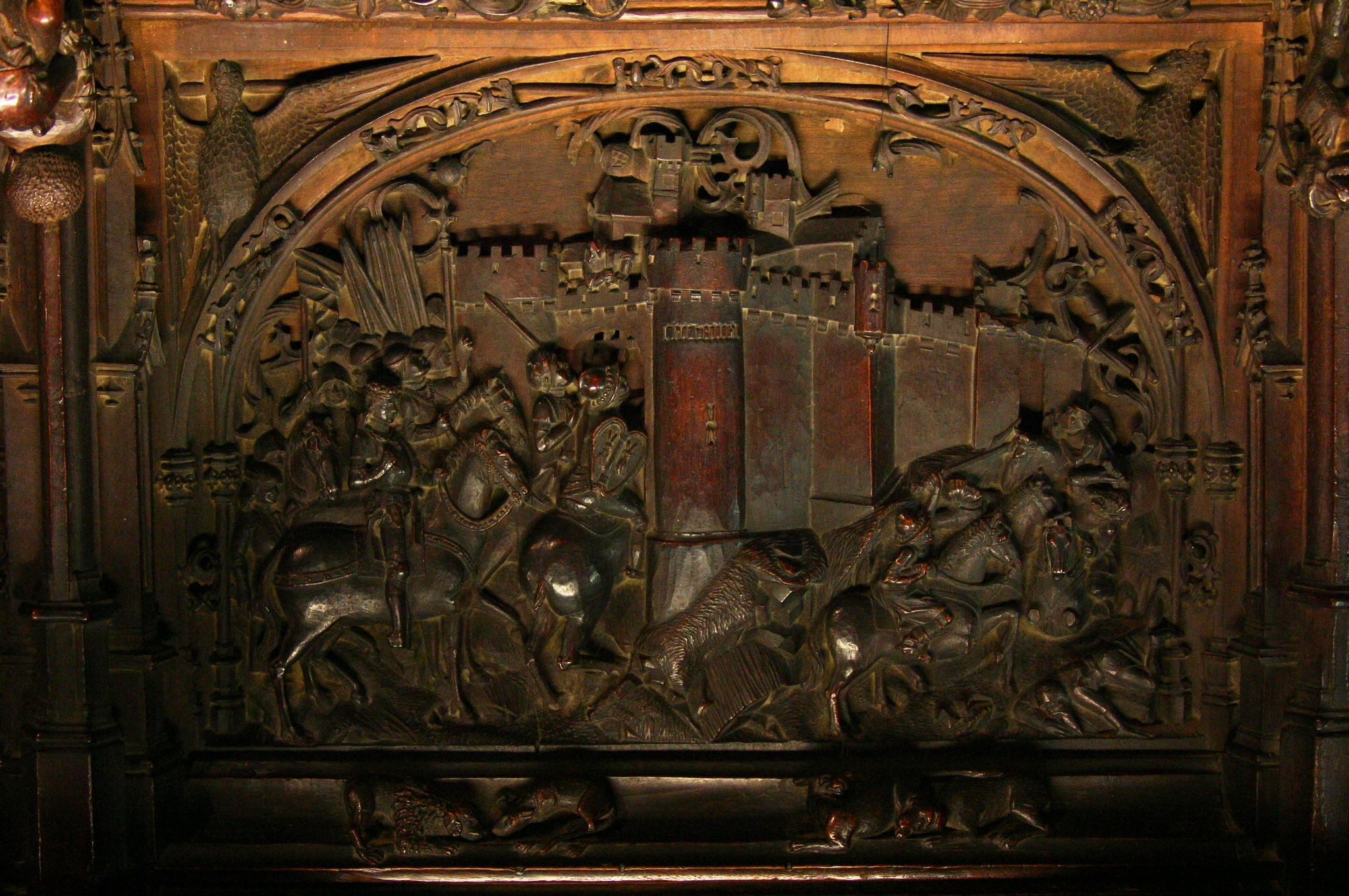 Cadeira no Coro